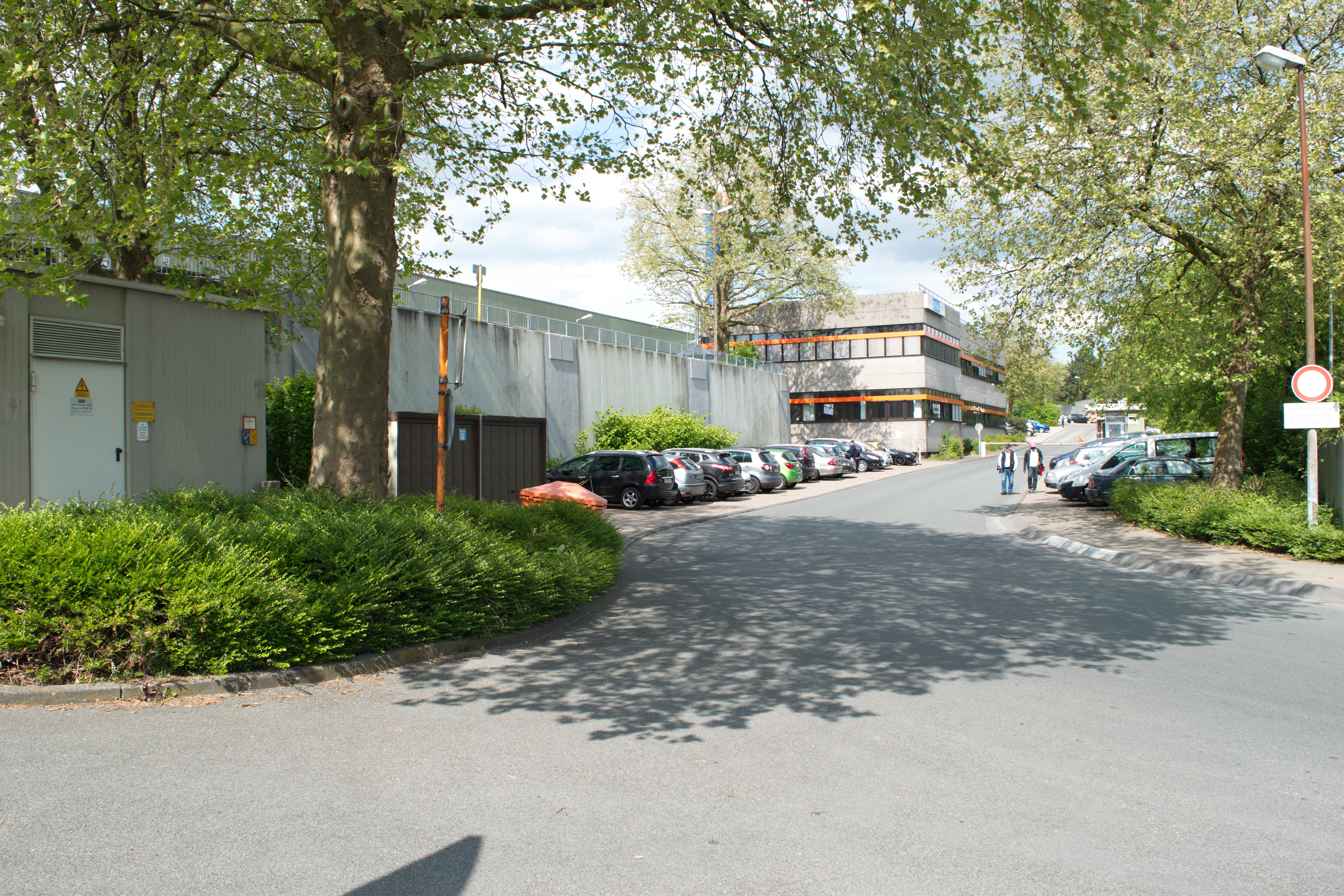 Deutscher Ring, Wuppertal